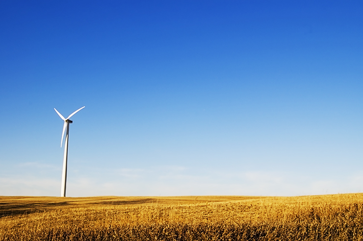 Near Lincoln, Nebraska, USA.